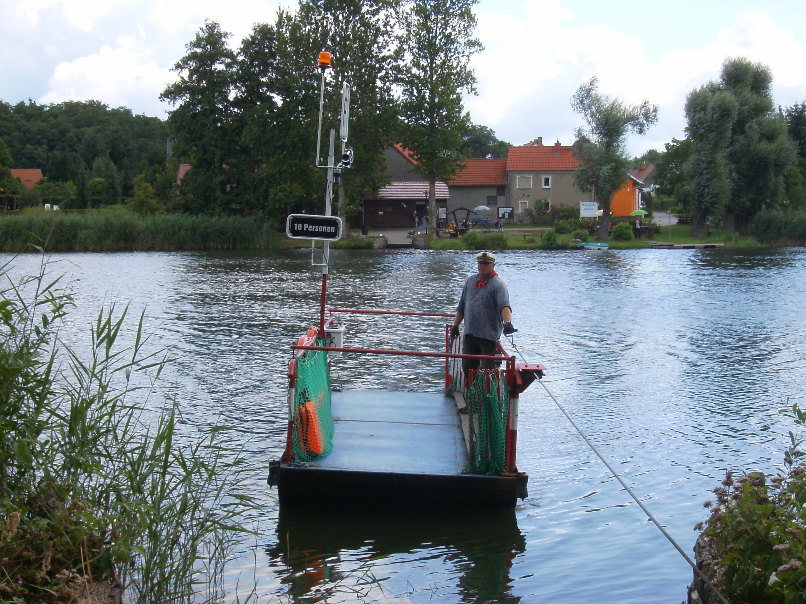 Handseilfähre über die Spree zwischen Ranzig und Leißnitz